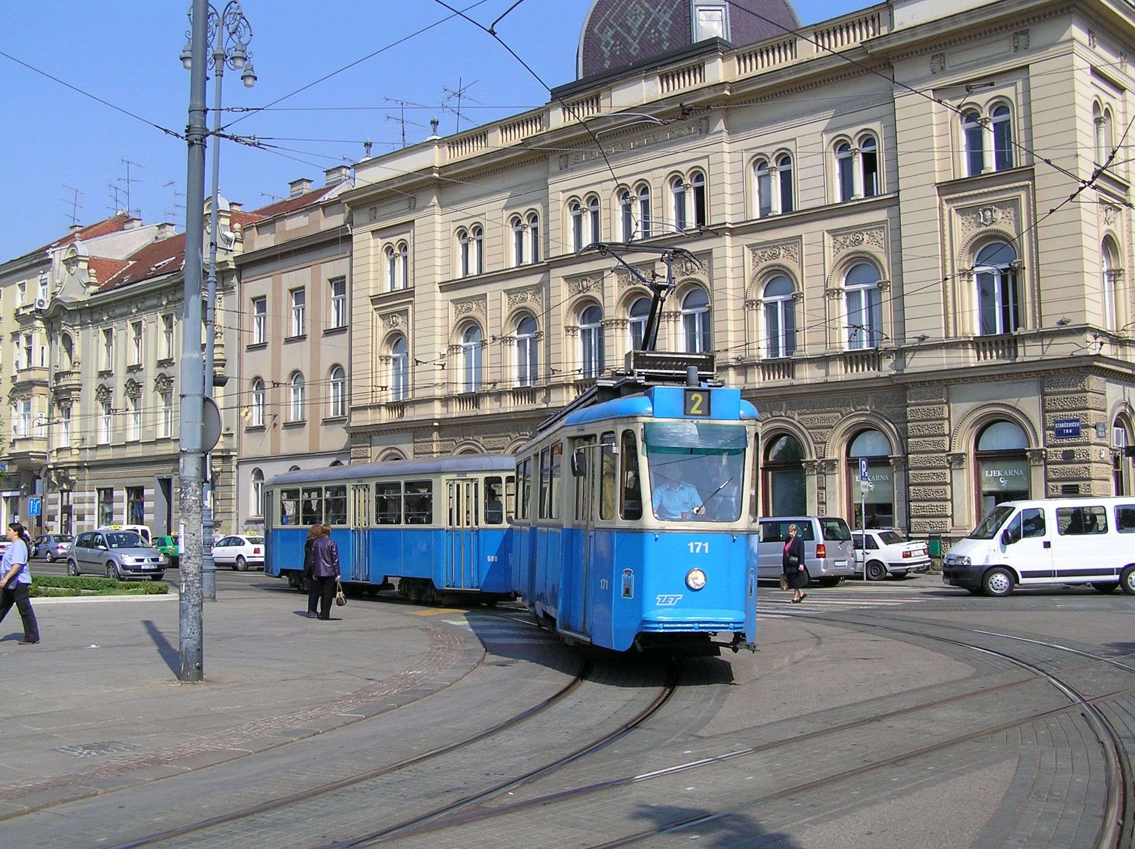 Tram in Zagreb